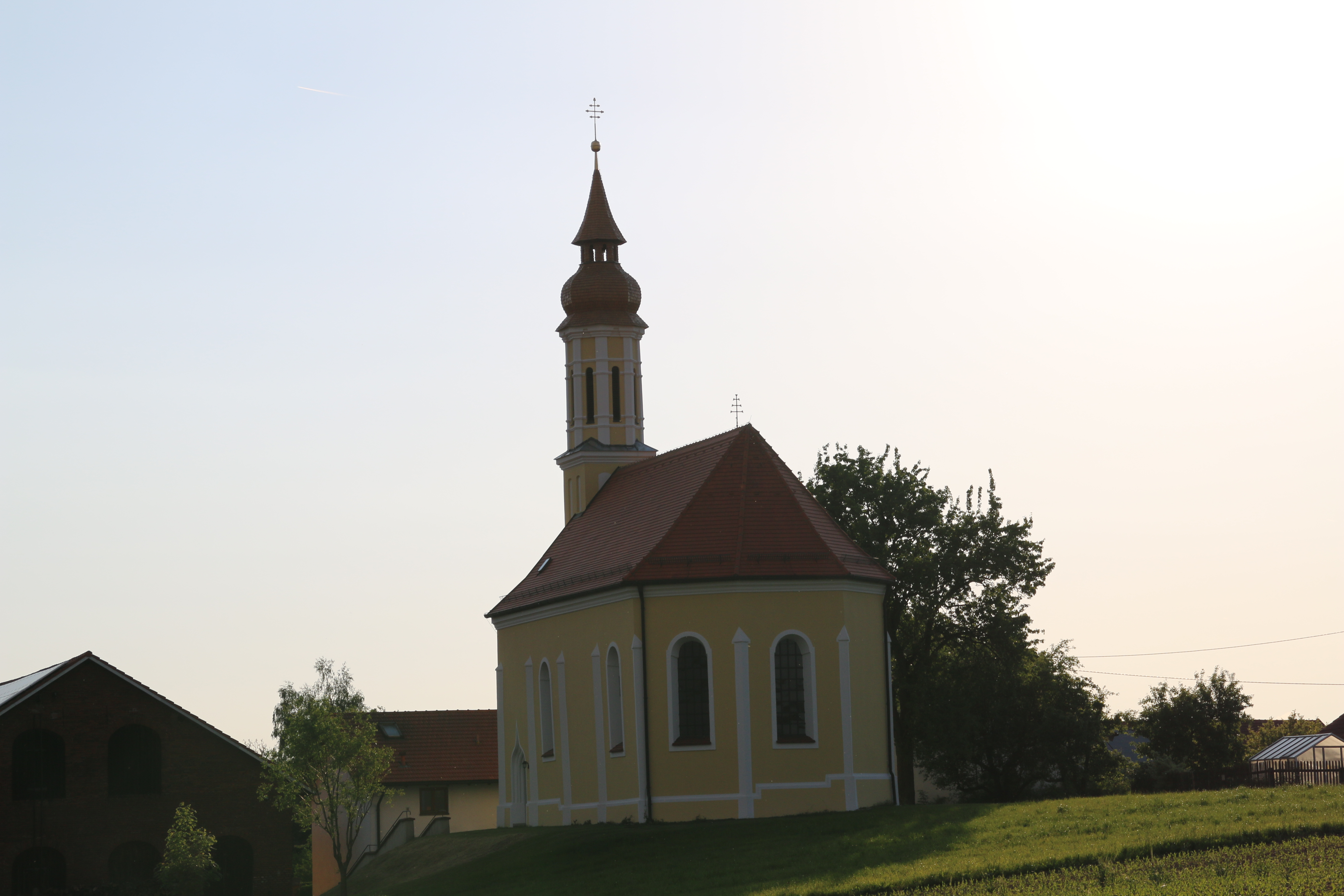 Das Bild zeigt die Hampersdorfer Kirche aus dem Osten kurz vor Sonnenuntergang